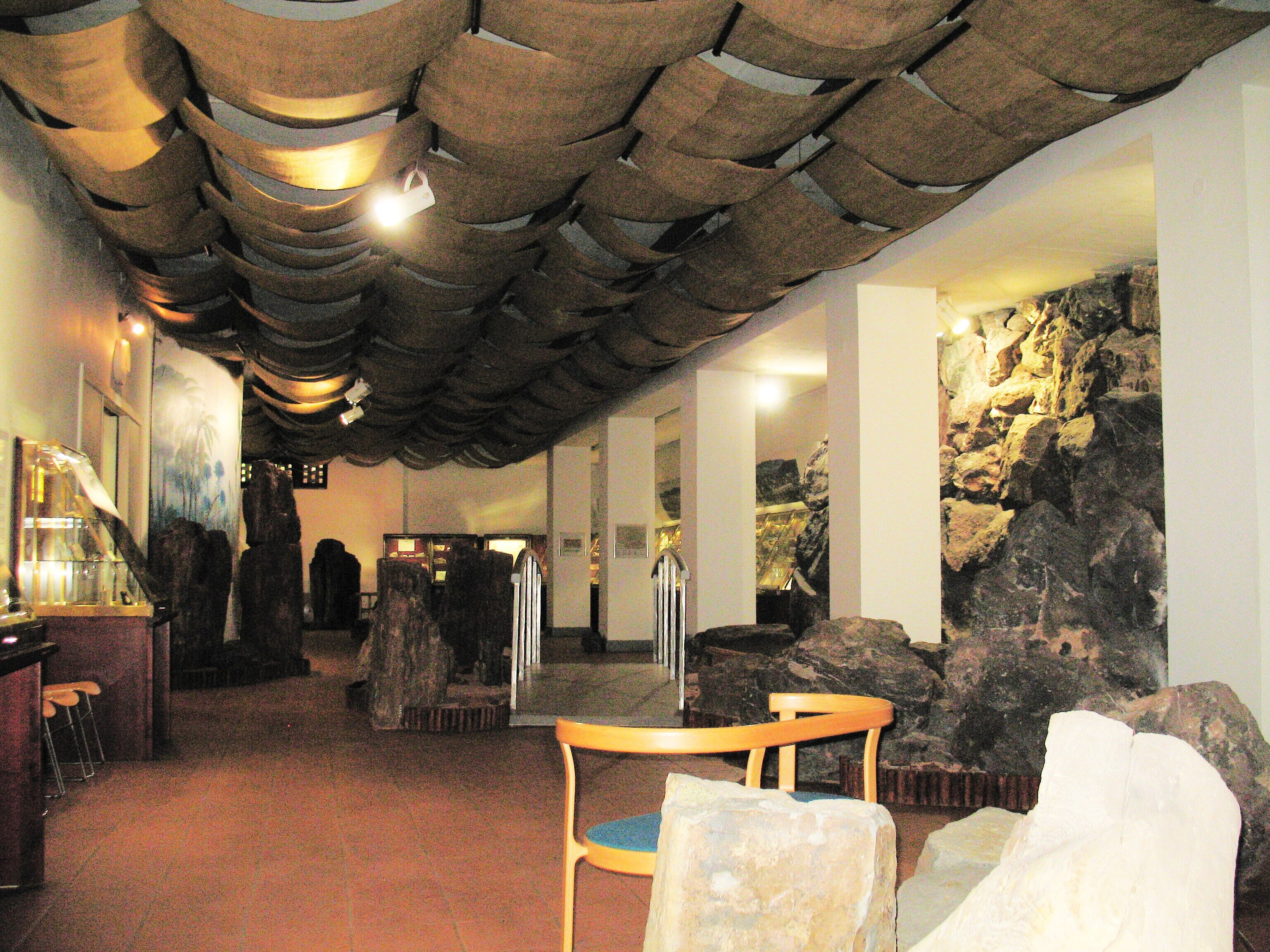 Celkový pohled do expozice geologického vývoje Země